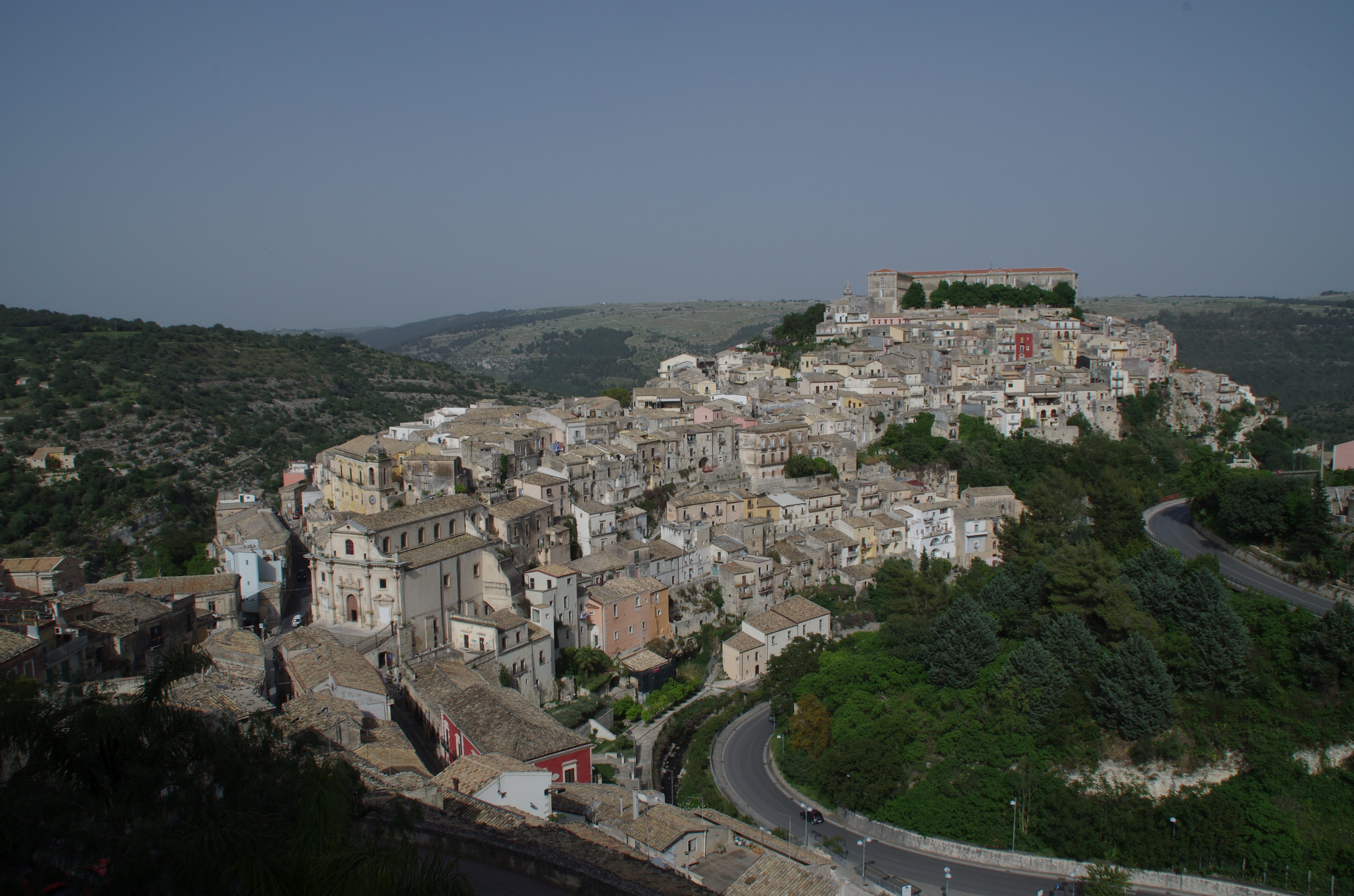 Ragusa auf Sizilien. Die Altstadt von Ragusa, Ragusa Ibla